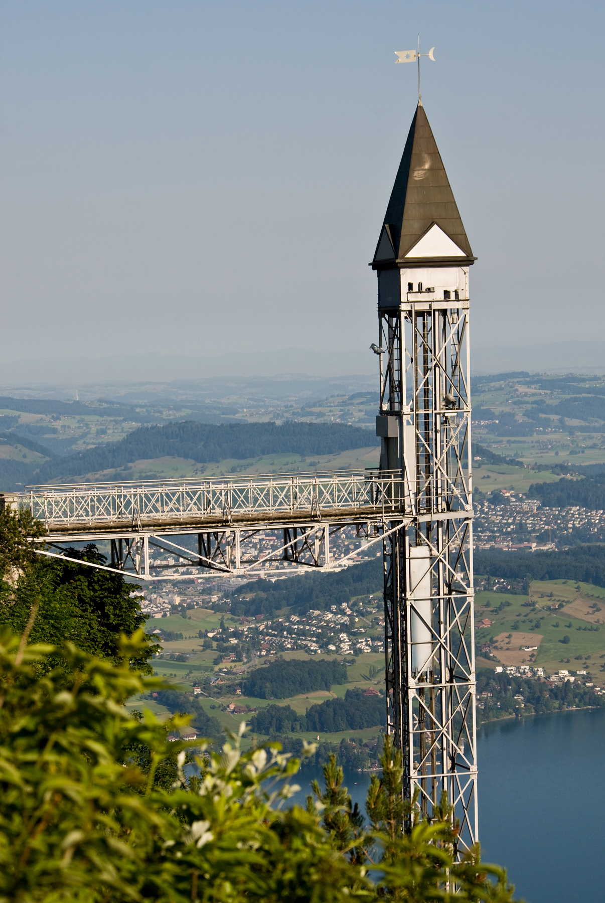 Hammetschwandlift am Bürgenstock